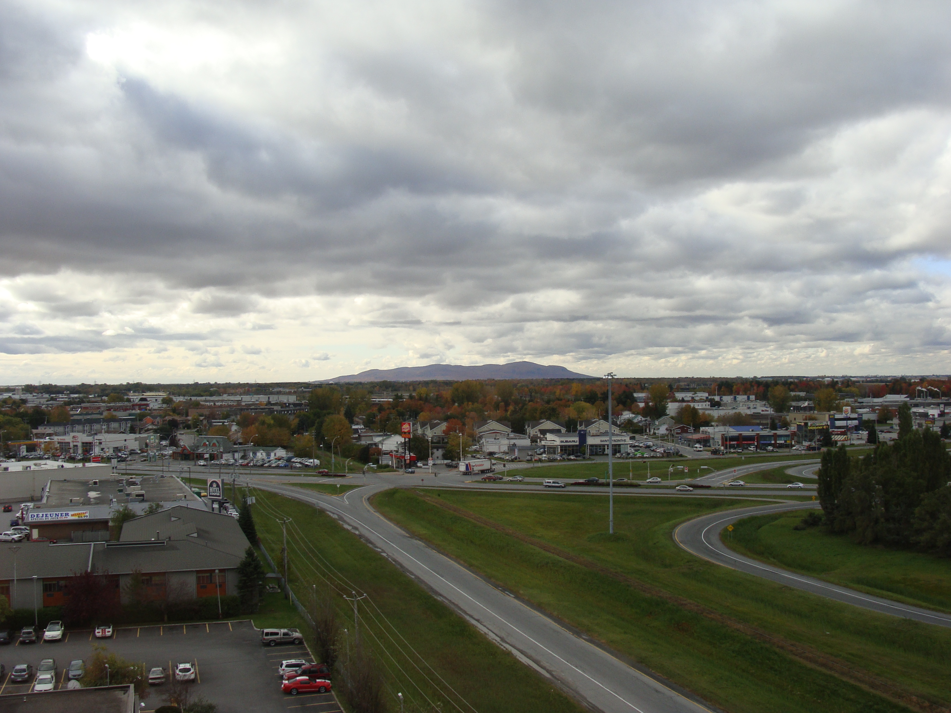 Vues panoramiques de Saint-Hyacinthe, au Québec (Canada). Vue panoramique de Saint-Hyacinthe, QC, Canada